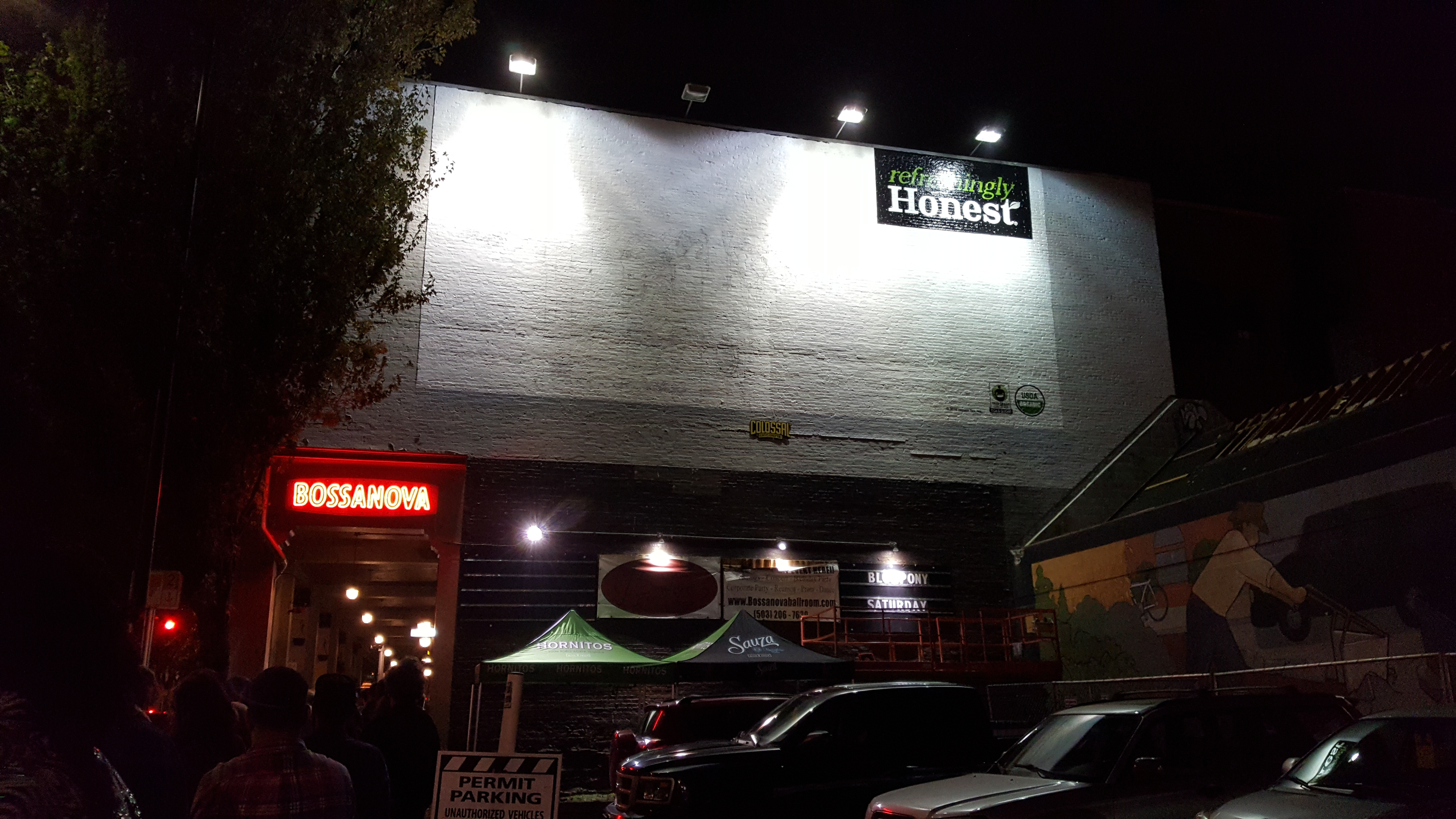 Bossanova Ballroom